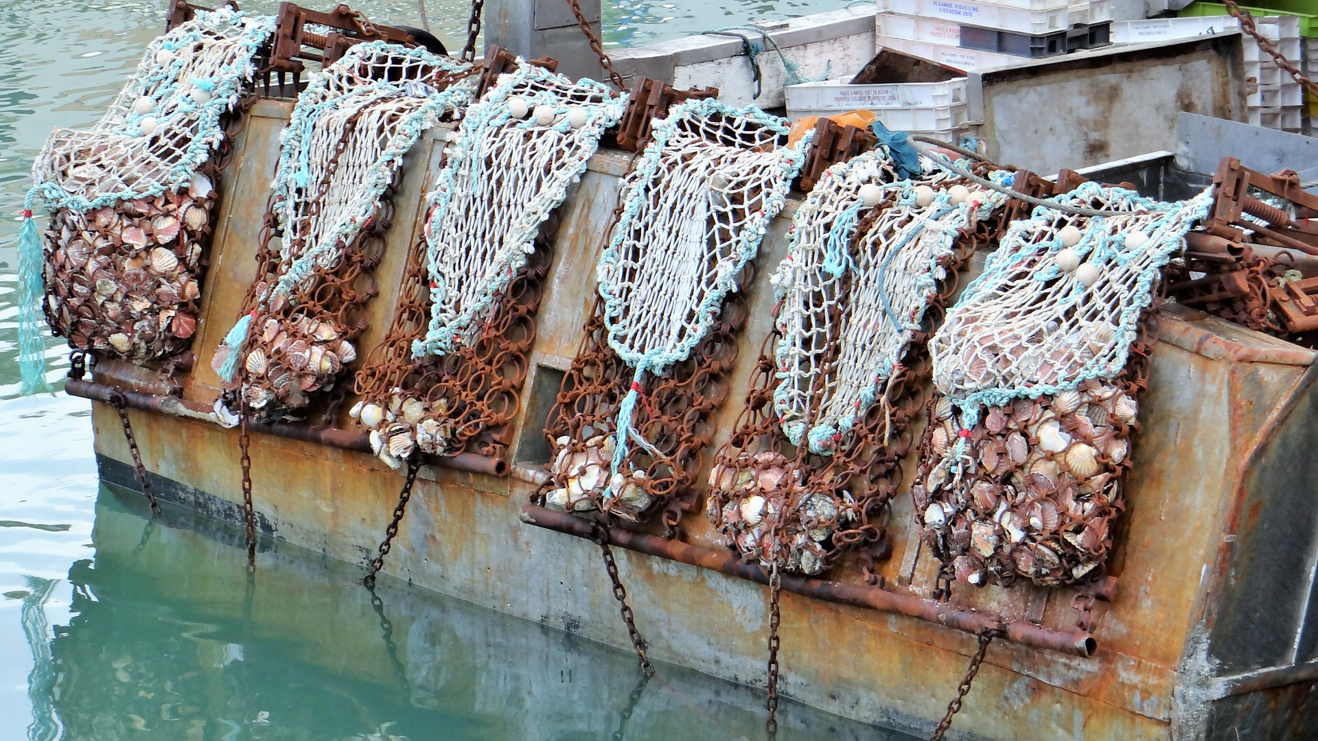 Coquillier pour la pêche à la coquille Saint-Jacques, Port-en-Bessin-Huppain, Normandie, France